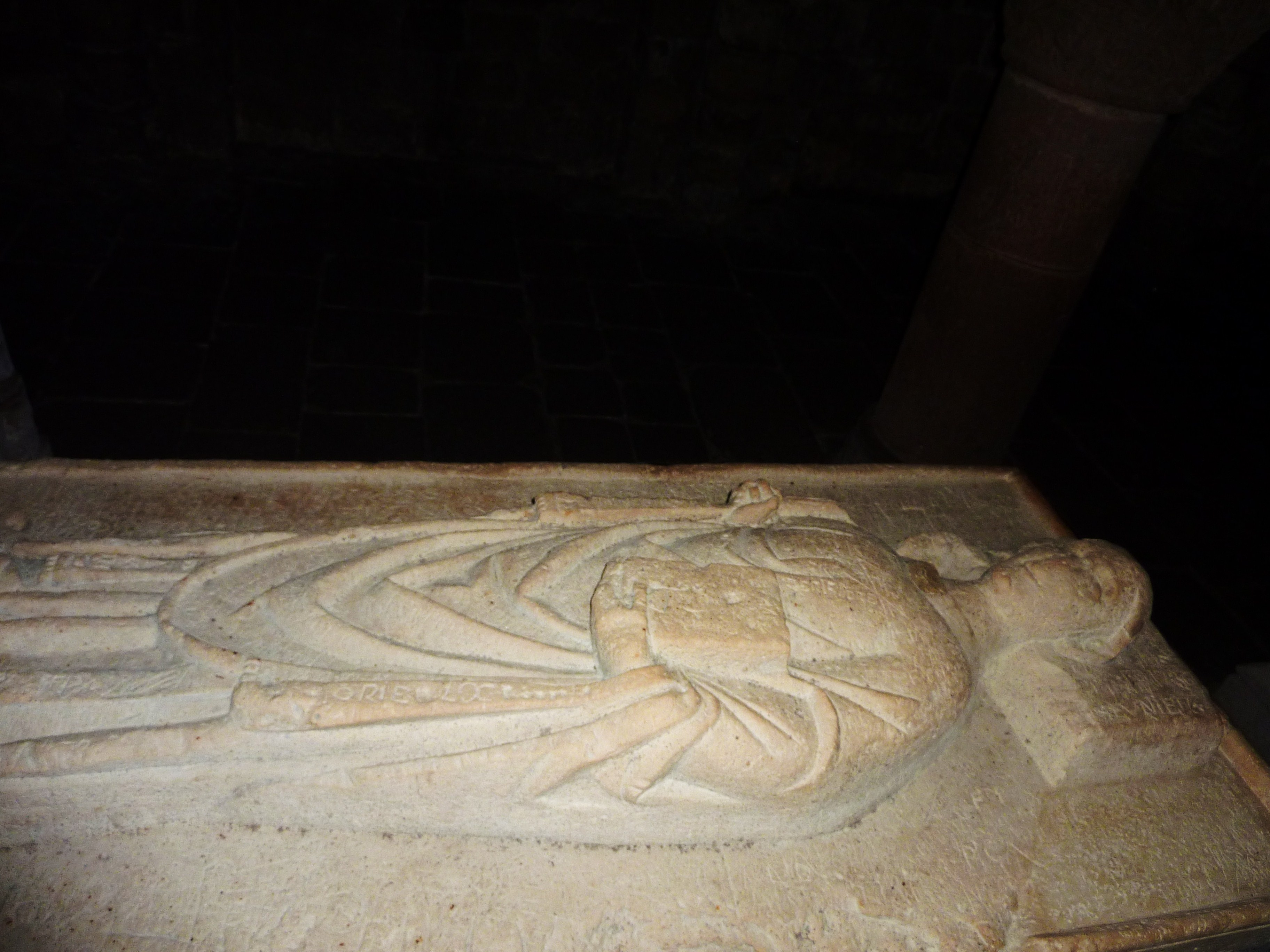 Quimperlé Eglise abbatiale sainte-Croix Le gisant de saint Gurloes, fondateur de l'abbaye